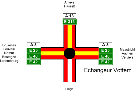 Schéma de l'échangeur de Vottem